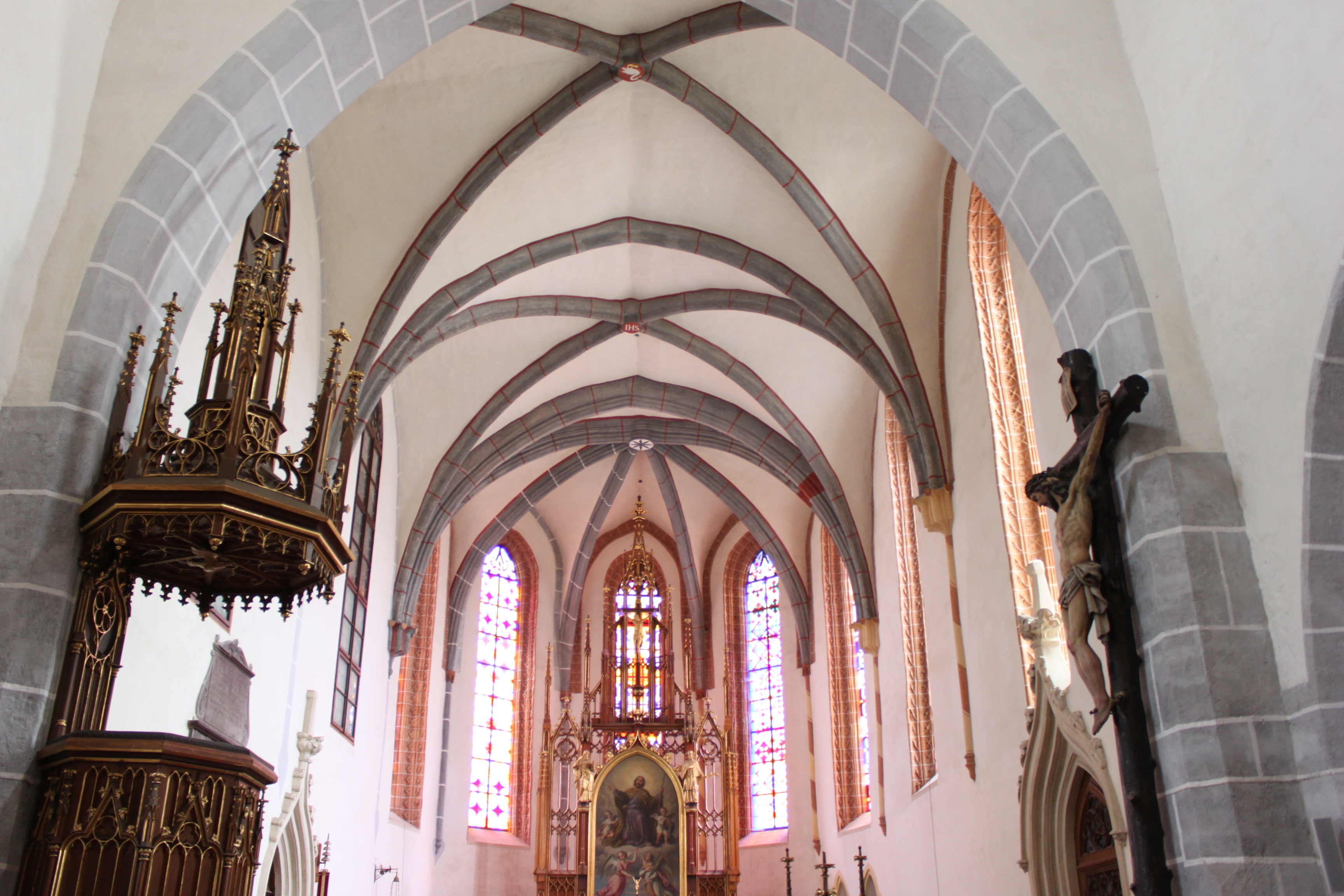 Kostel sv. Jakuba, presbytář